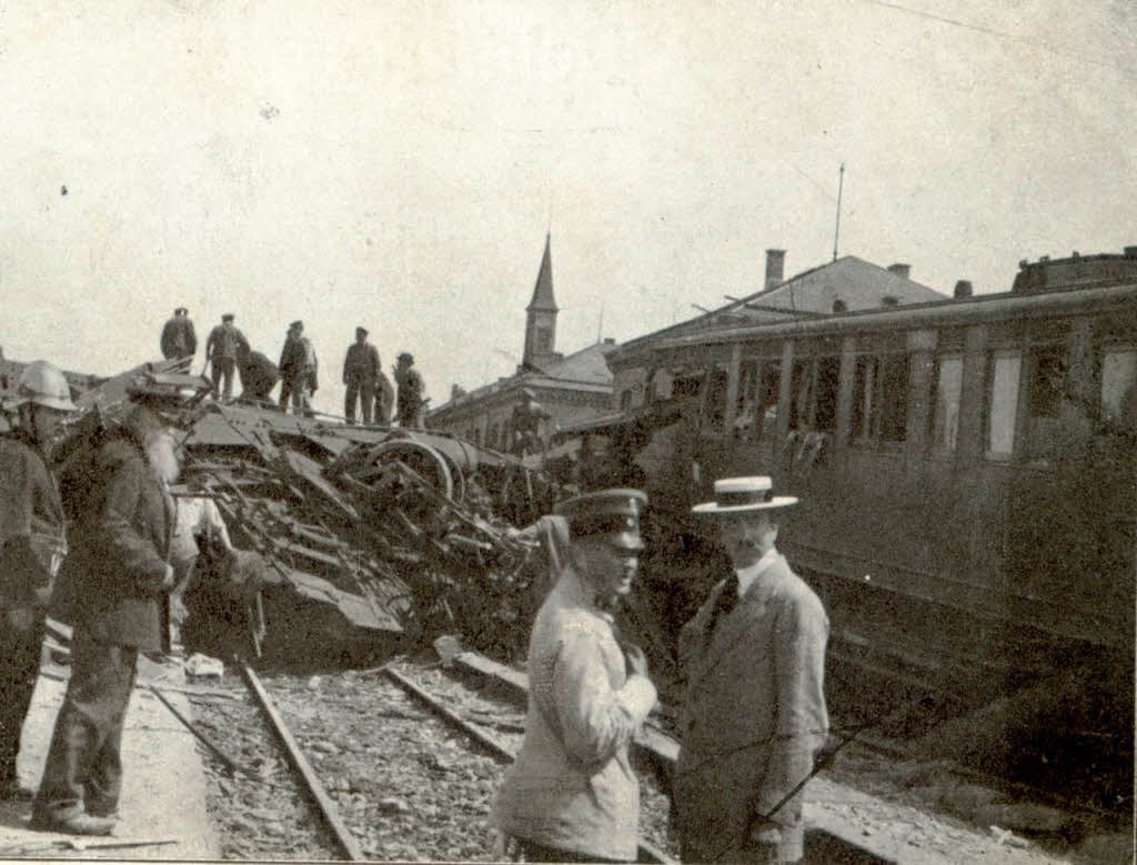 Beim Eisenbahnunfall von Müllheim am 17. Juli 1911 fuhr der D-Zug 9 von Mailand nach Berlin mit stark überhöhter Geschwindigkeit in eine Baustelle im Bahnhof Müllheim und entgleiste, weil der Lokomotivführer vorher größere Mengen Wein und Bier getrunken hatte. 14 Tote und 32 zum Teil schwer Verletzte waren die Folge. Bauarbeiten im Bahnhof und überhöhte Geschwindigkeit des Zuges ließen die Waggons entgleisen.